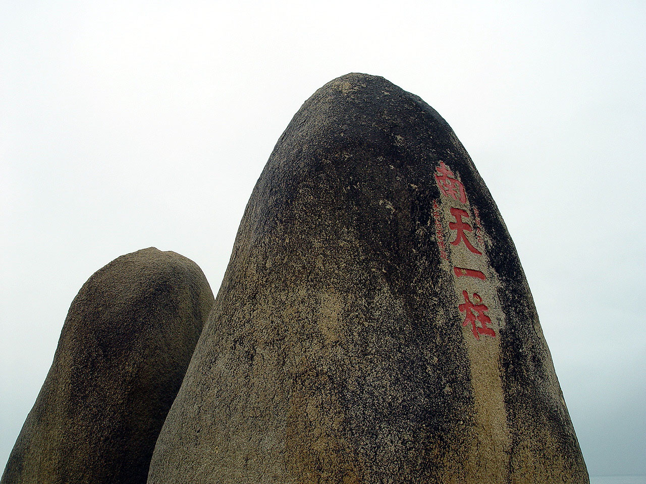 南天一柱